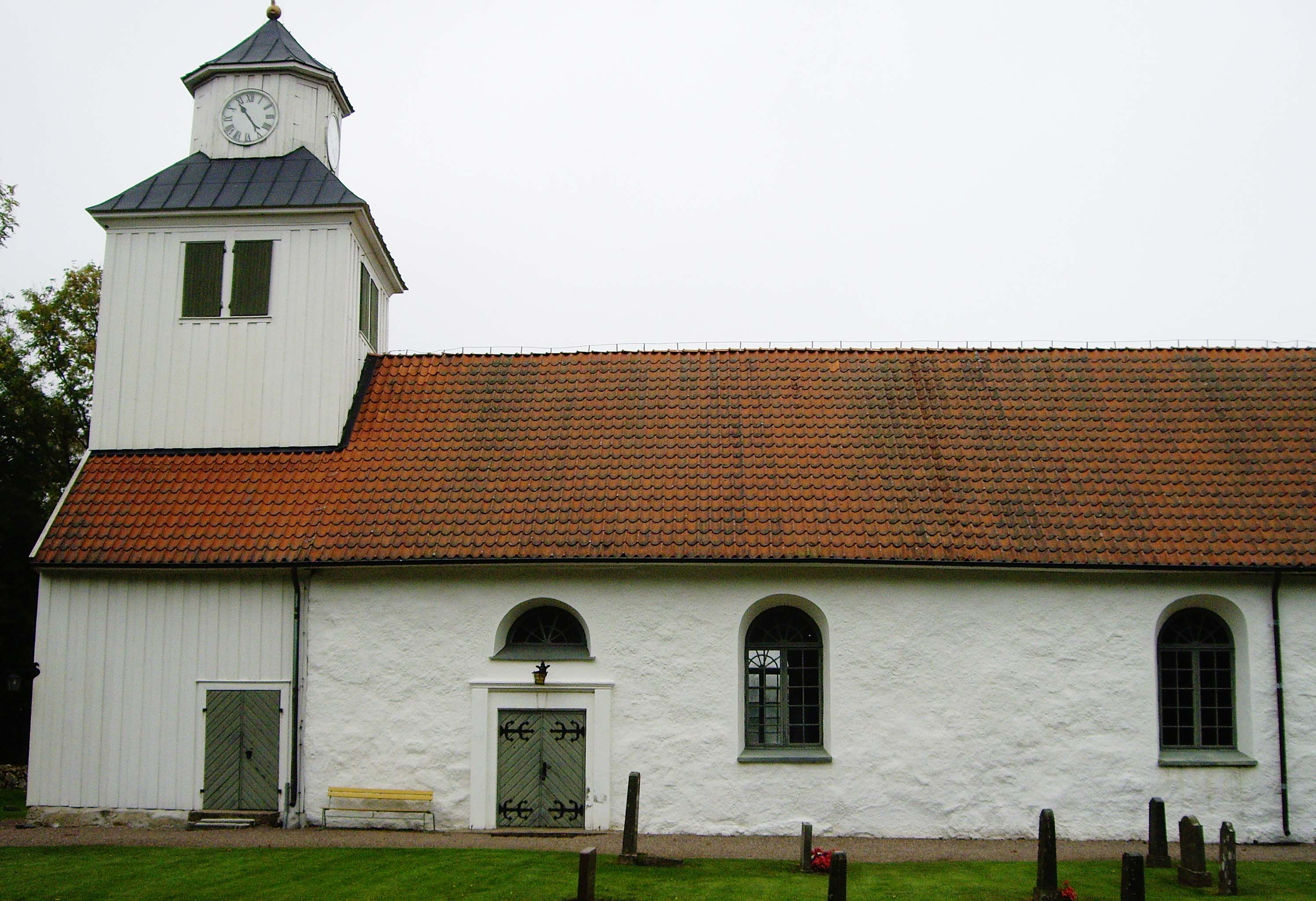 Abilds kyrka